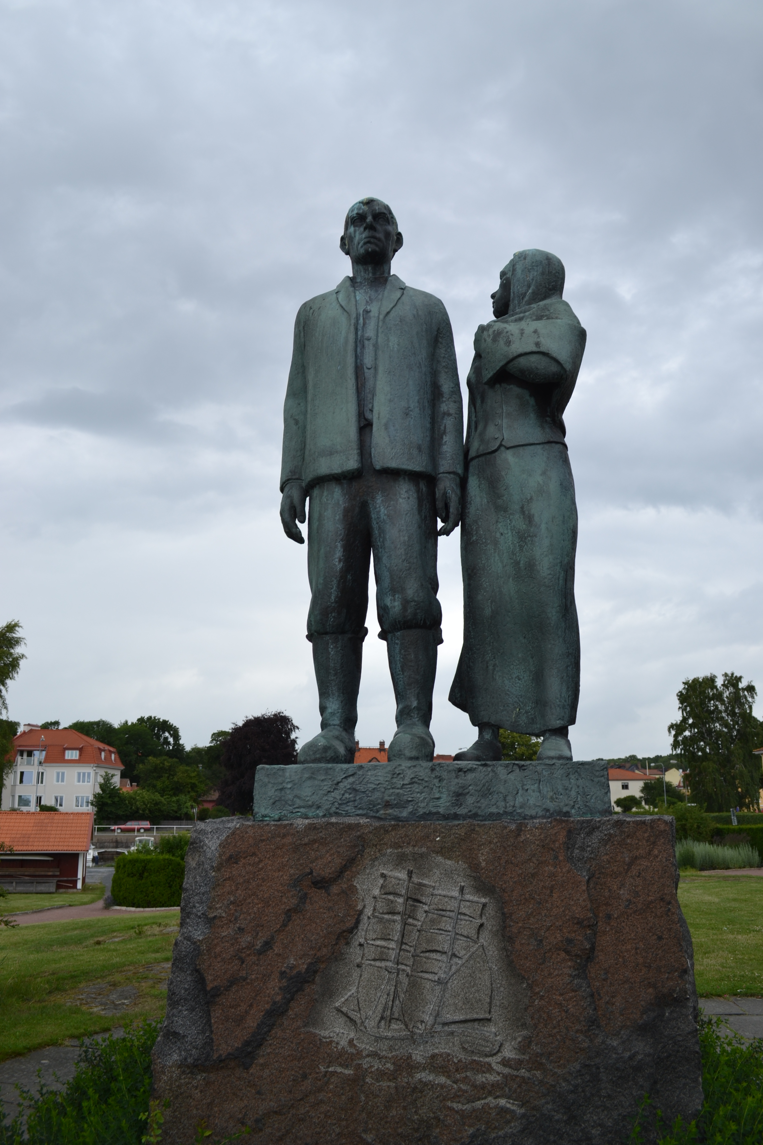 utvandrarmonumentet 2013, Karlshamn